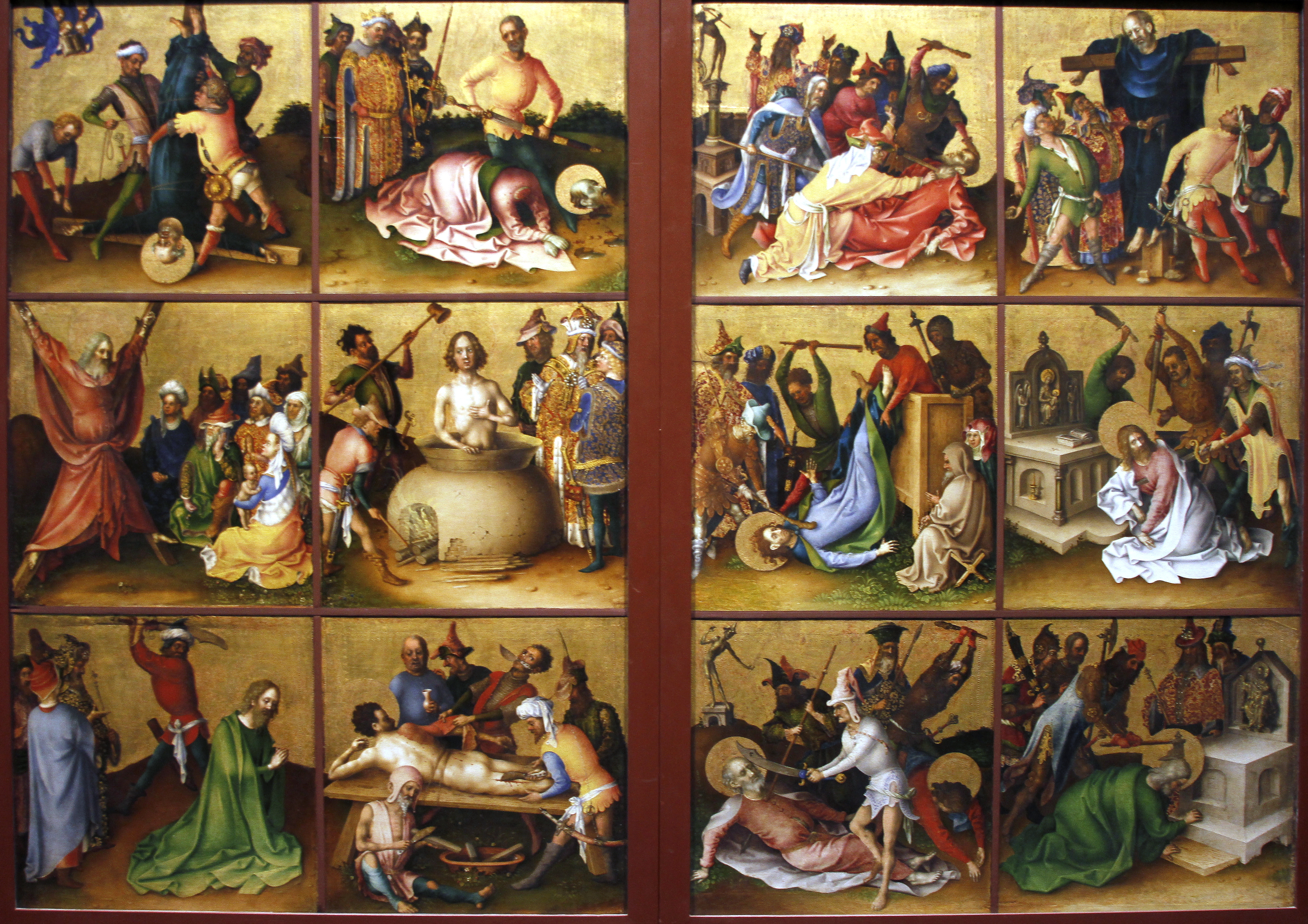 Städel - Frankfurt am Main - Germany